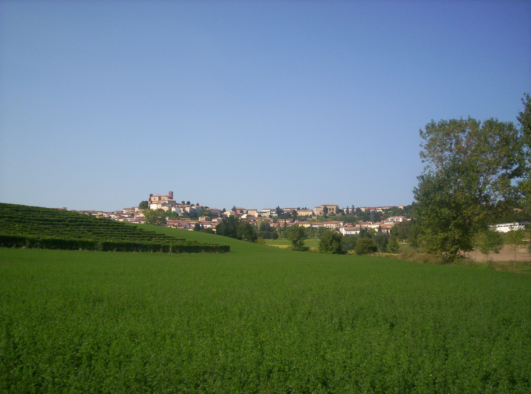 vista di Casorzo (Asti), Italia